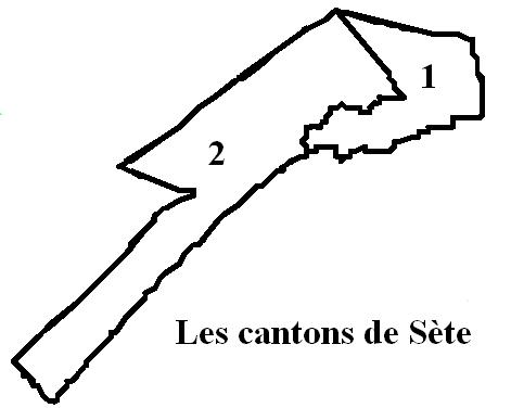 Les deux cantons de Sète (Hérault). Image personnelle